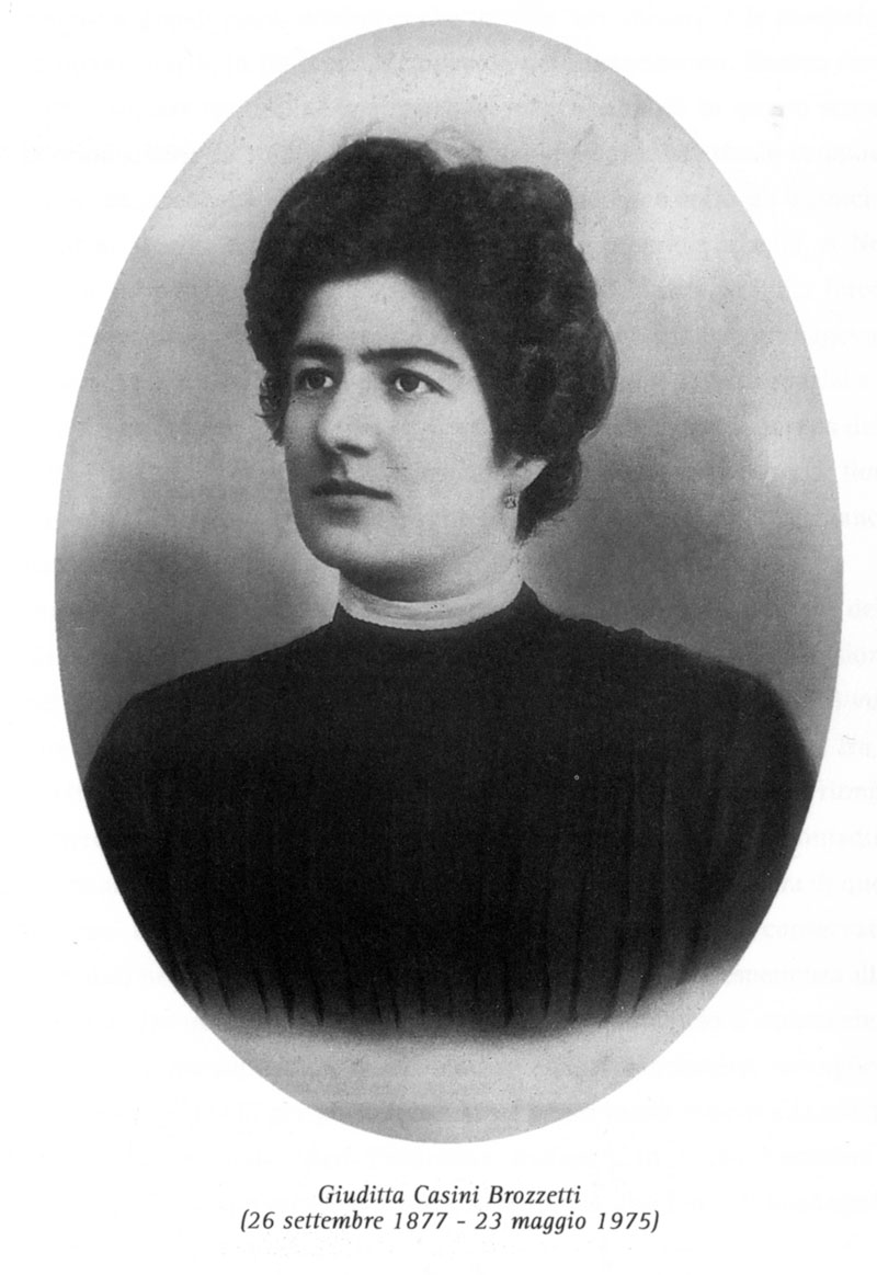 Prima imprenditrice tessile in Umbria